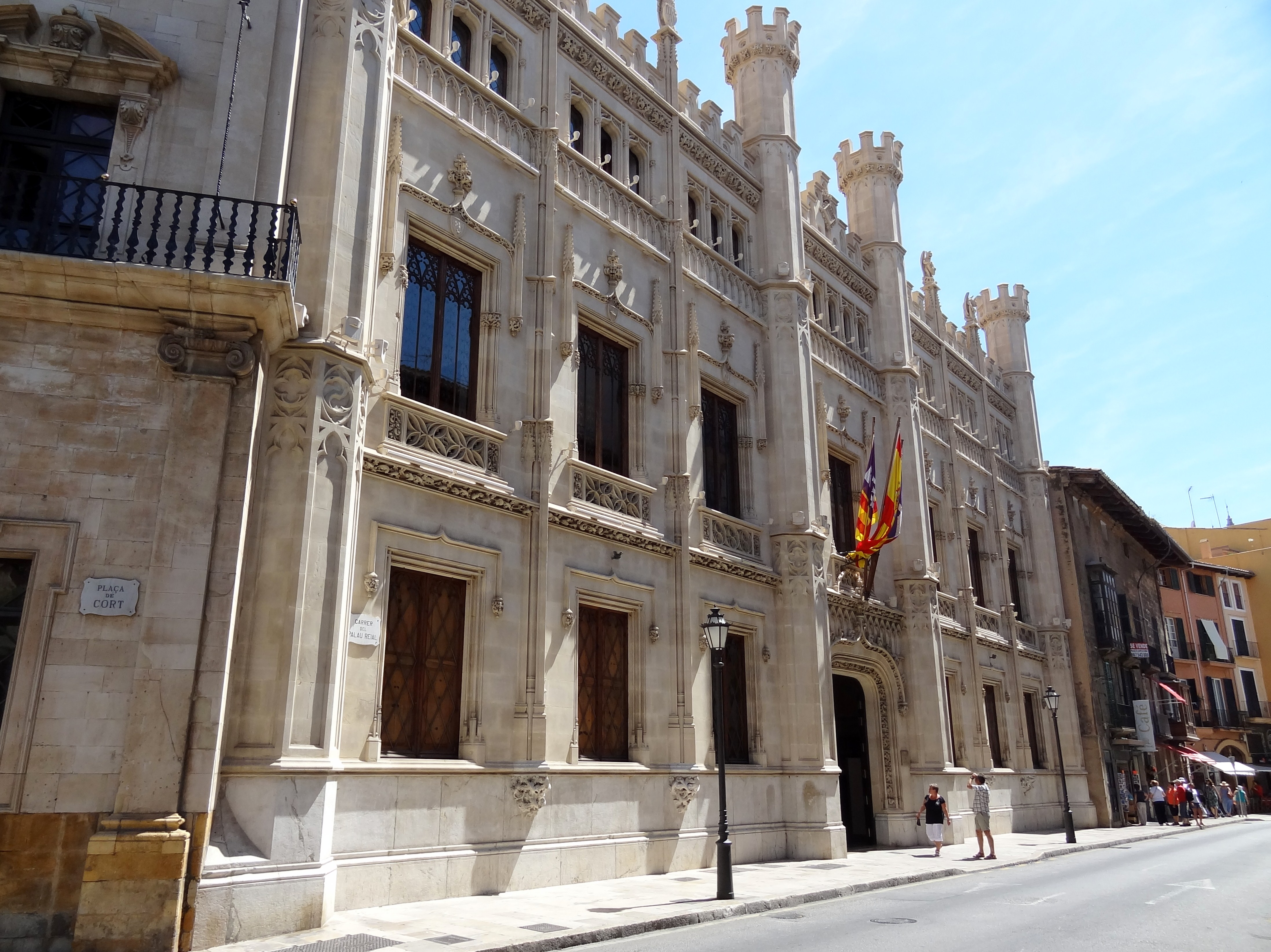 Consell Insular de Mallorca in Palma, Mallorca, Spanien